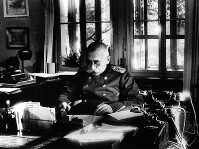 Johannes Schänker an seinem Schreibtisch